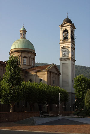 Chiesa San Vitale in Chiasso